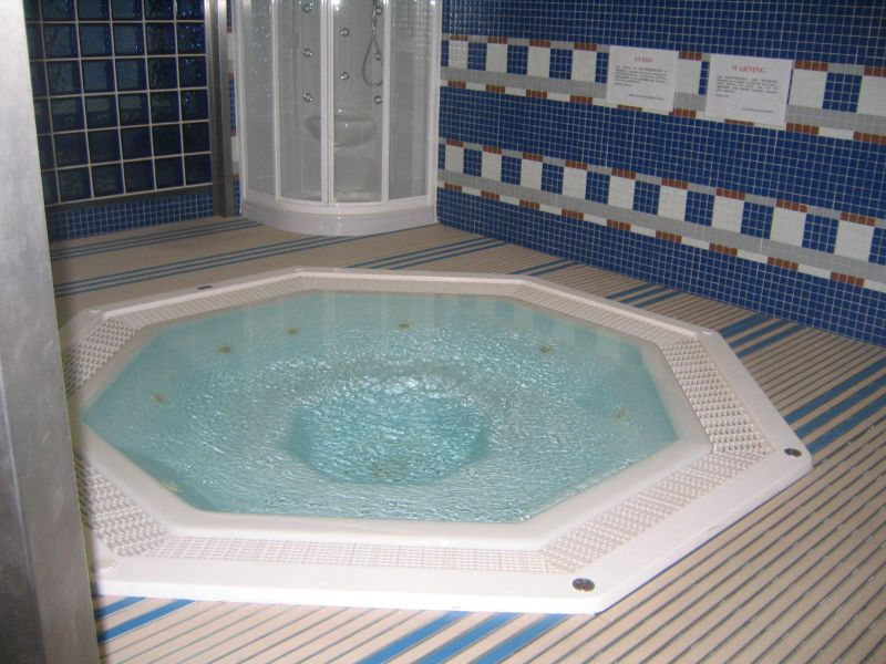 Estacio Santiago Bernabeu